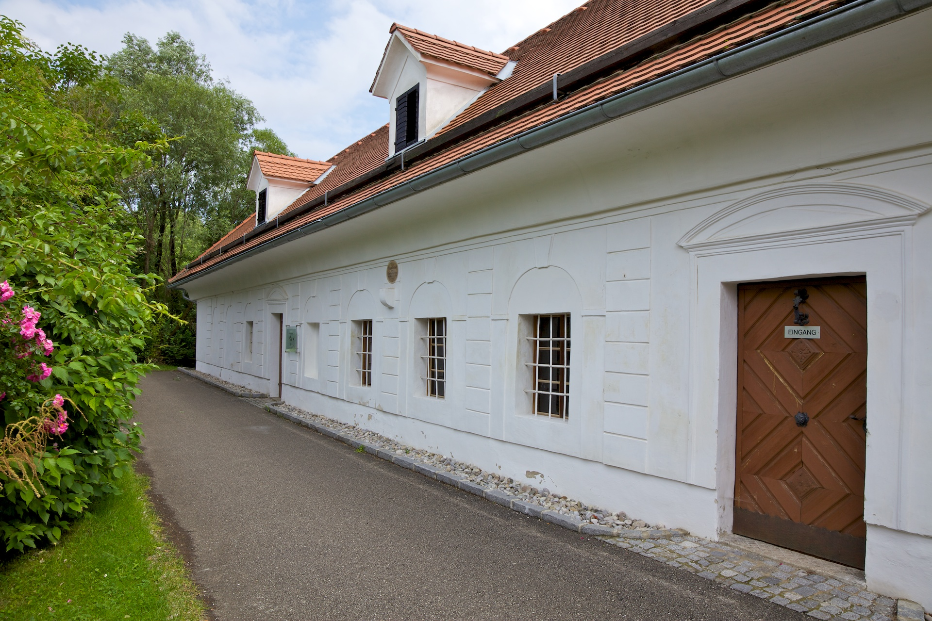 Feyreggerhaus der ehemaligen Sensenschmiede am Gries